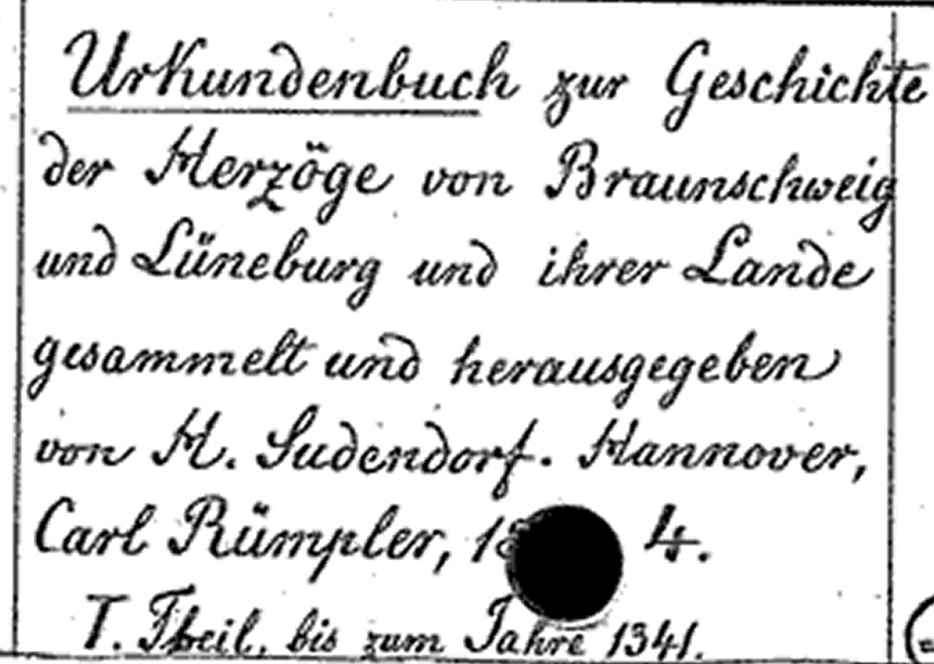 Hans Friedrich Georg Julius Sudendorf(1812-1870)